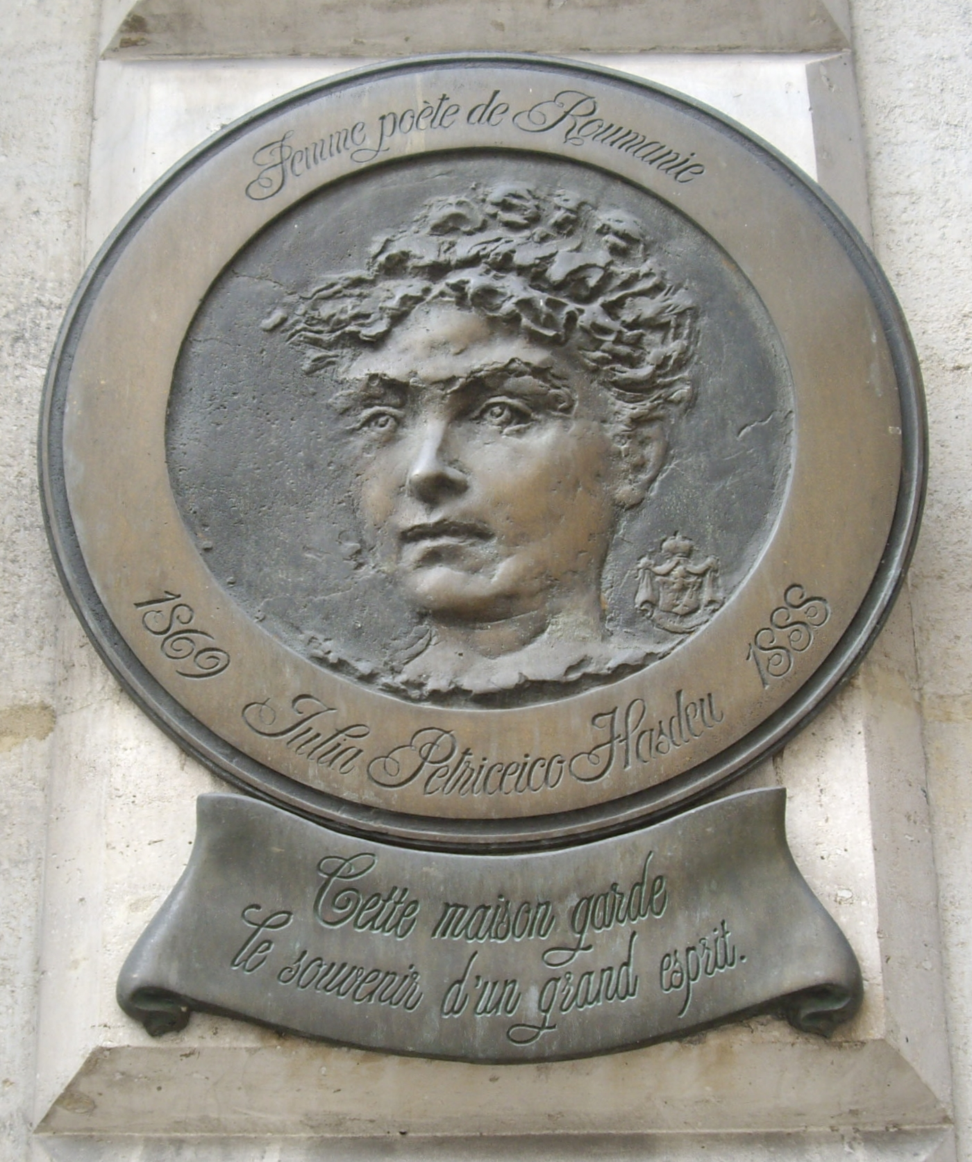 Plaque apposée au n° 28 de la rue Saint-Sulpice, Paris 6e, où habita la poétesse Iulia Hasdeu (1869-1888). « Femme poète de Roumanie. 1869 - Julia Petriceico Hasdeu [Iulia Petriceicu Hasdeu] - 1888. Cette maison garde le souvenir d'un grand esprit. »